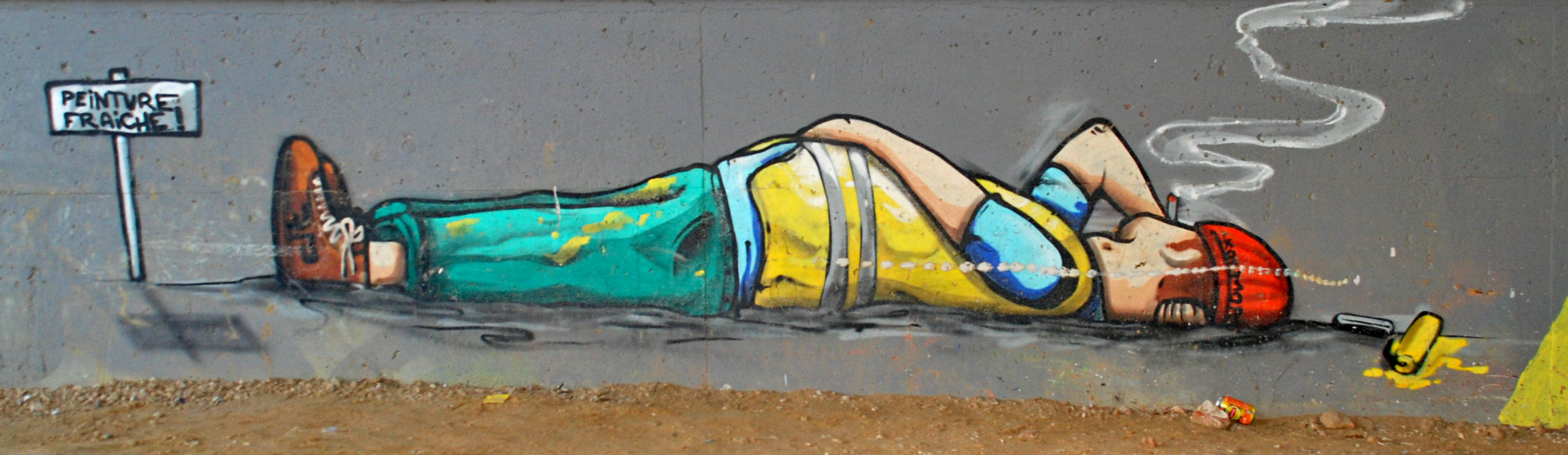 Belgique - Louvain-la-Neuve - Boulevard de Wallonie - Graffeur couché (Kosmopolite Art Tour 2015)